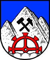 Gemeinde Mühlbach am Hochkönig: Im blauen Schild ein silberner Dreifels, belegt mit gekreuzten schwarzem Eisen und Schlägel und davor aus naturfärbigem Wellenschildfuß ragend ein rotes Mühlrad